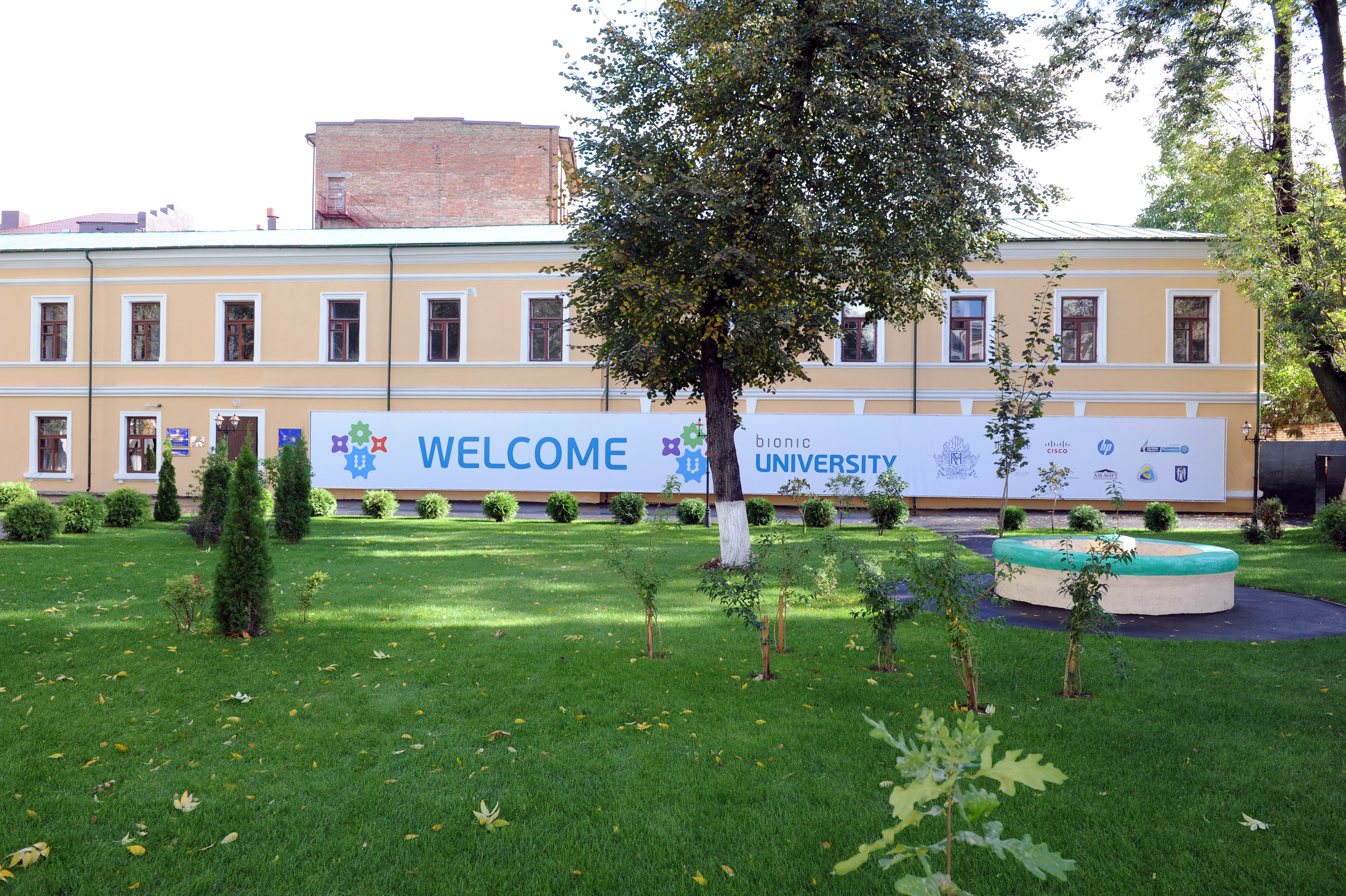 Церемонія відкриття BIONIC University.